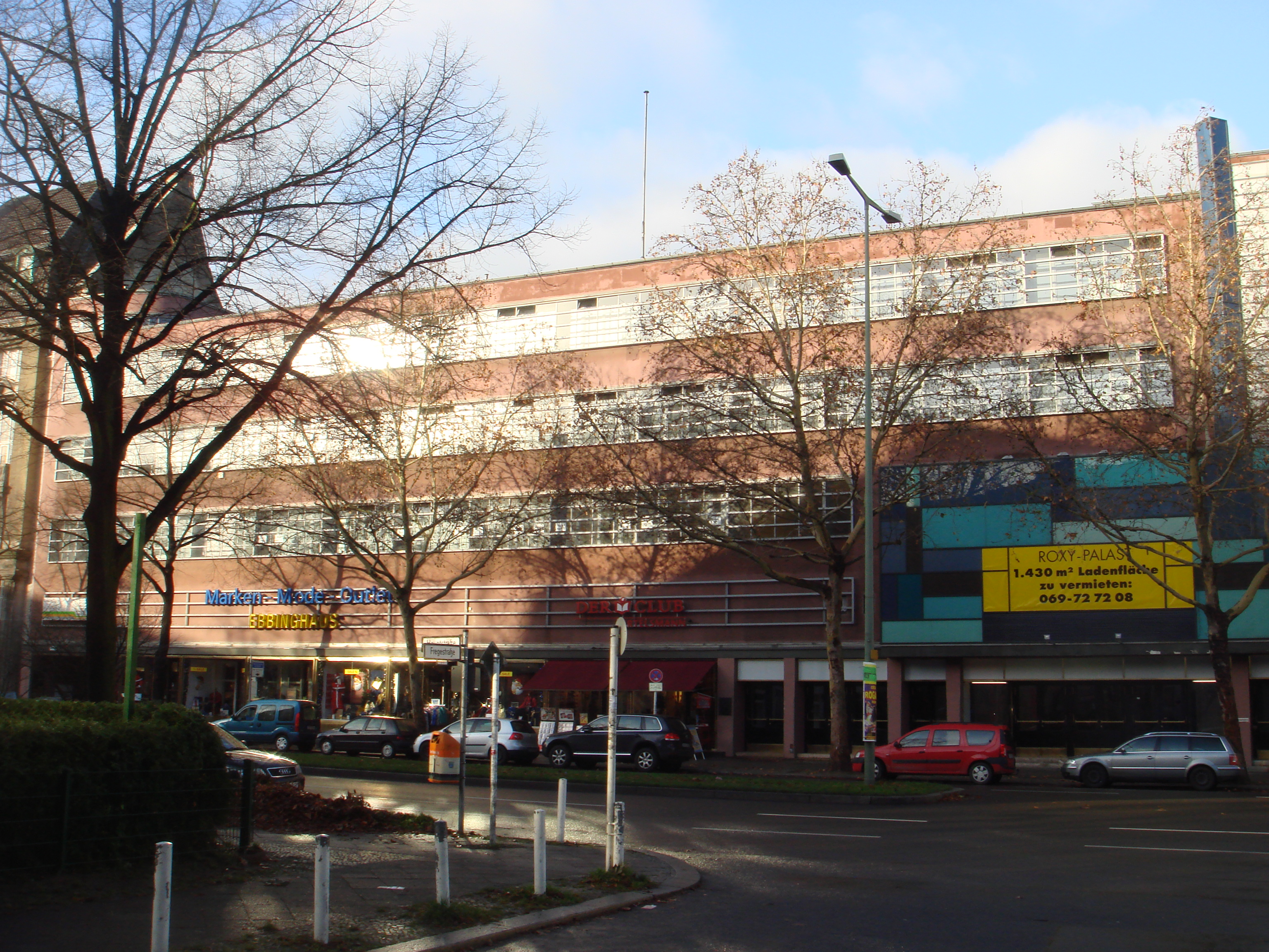 Roxi-Palast, Hauptstraße 78/79, Berlin-Schöneberg